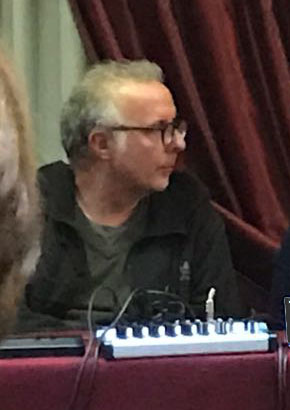 Conferenza stampa con il regista e sceneggiatore italiano Luca Miniero.